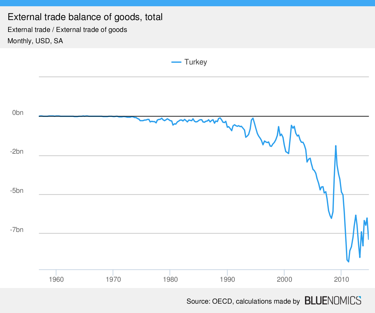 Dieser Chart zeigt die Entwicklung der Handelsbilanz der Türkei